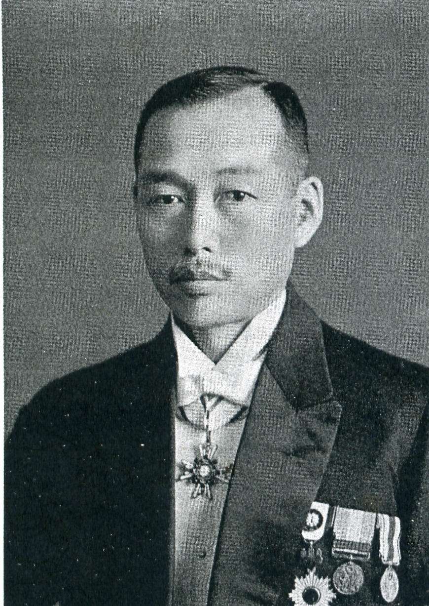 この写真は、田中善立（1874-1955）の写真です。